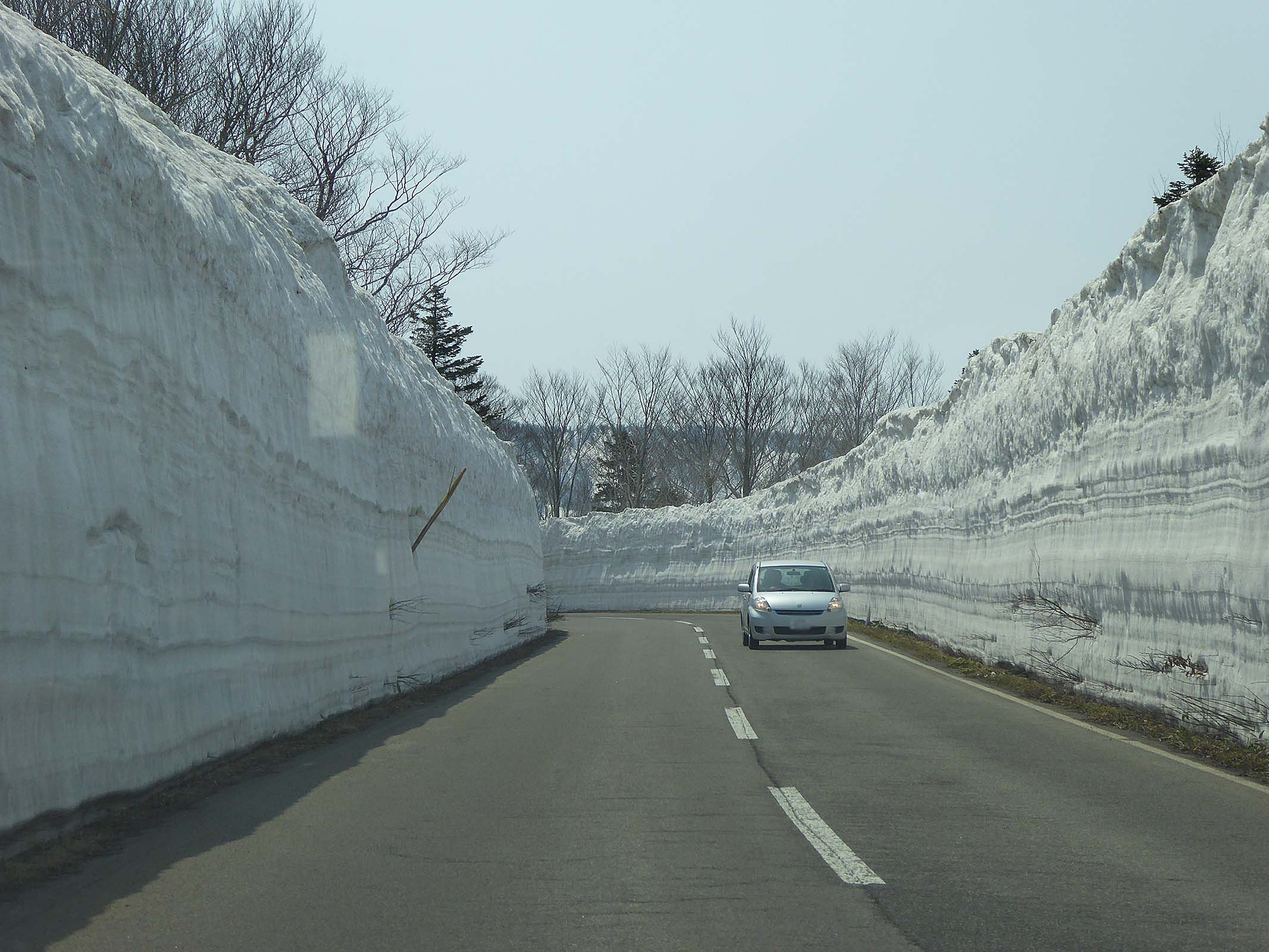 酸ヶ湯温泉付近